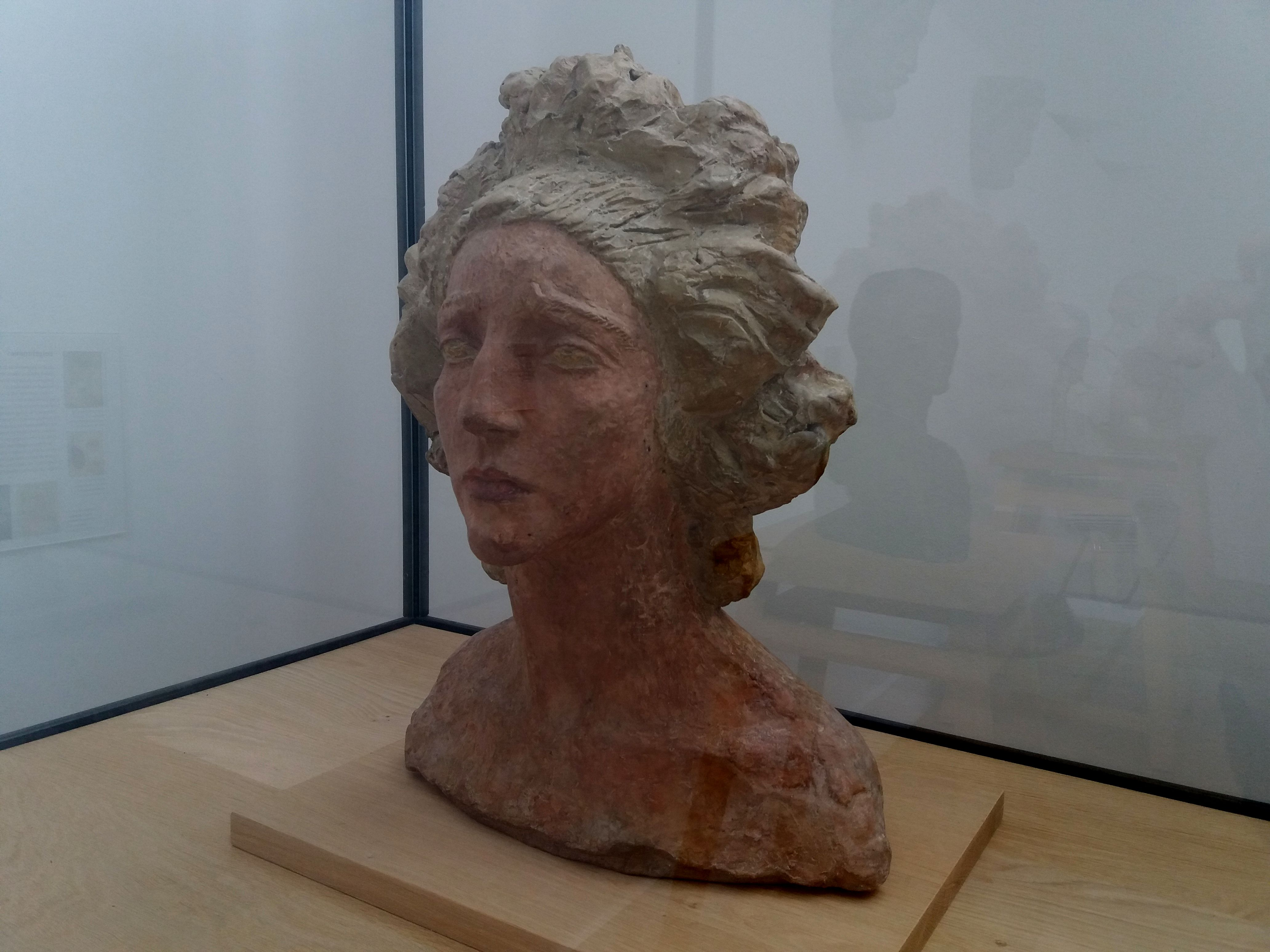 Buste de La Chilienne, le modèle est Henriette Petit.